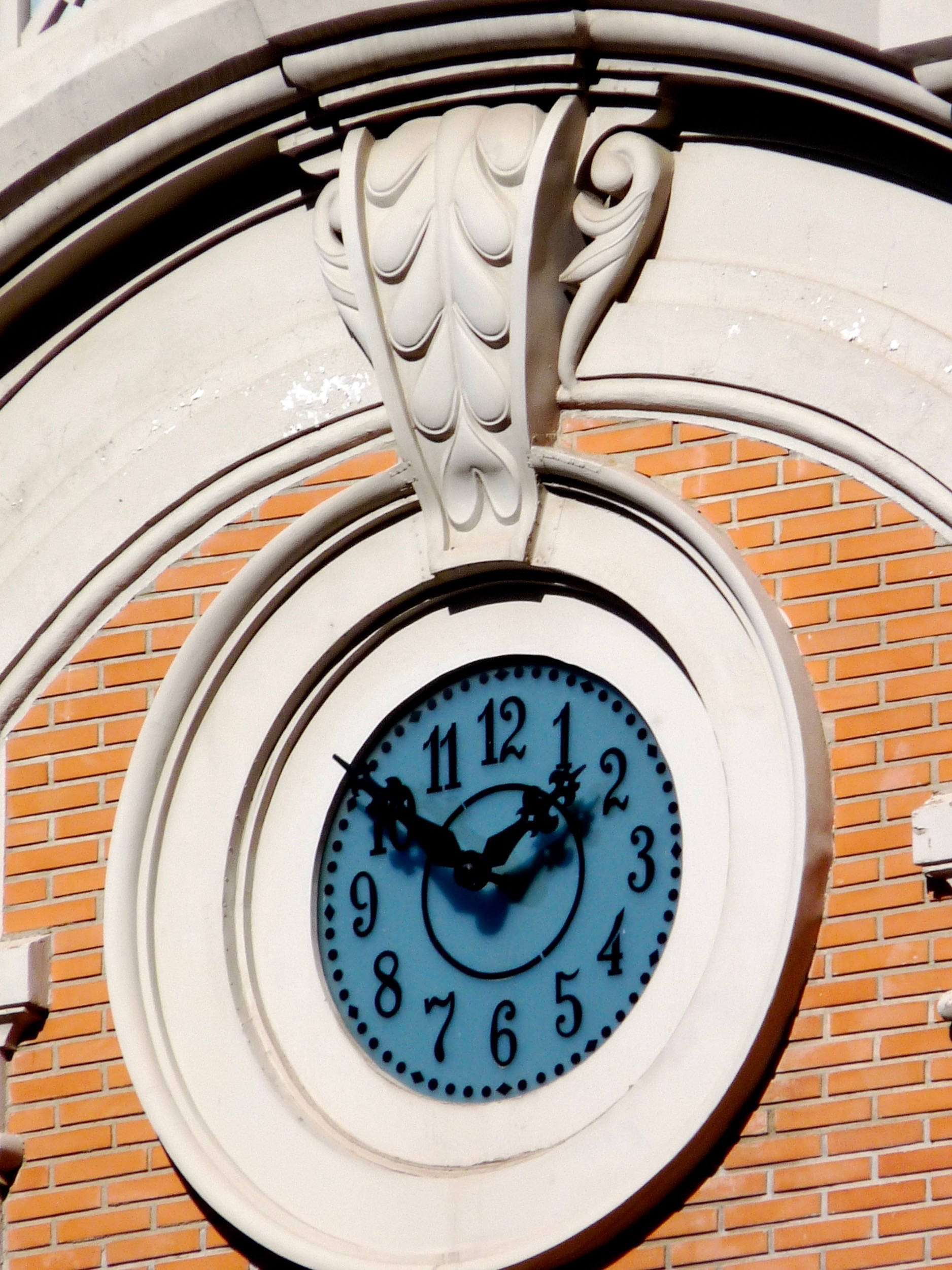 Reloj Casa Cortés Albacete